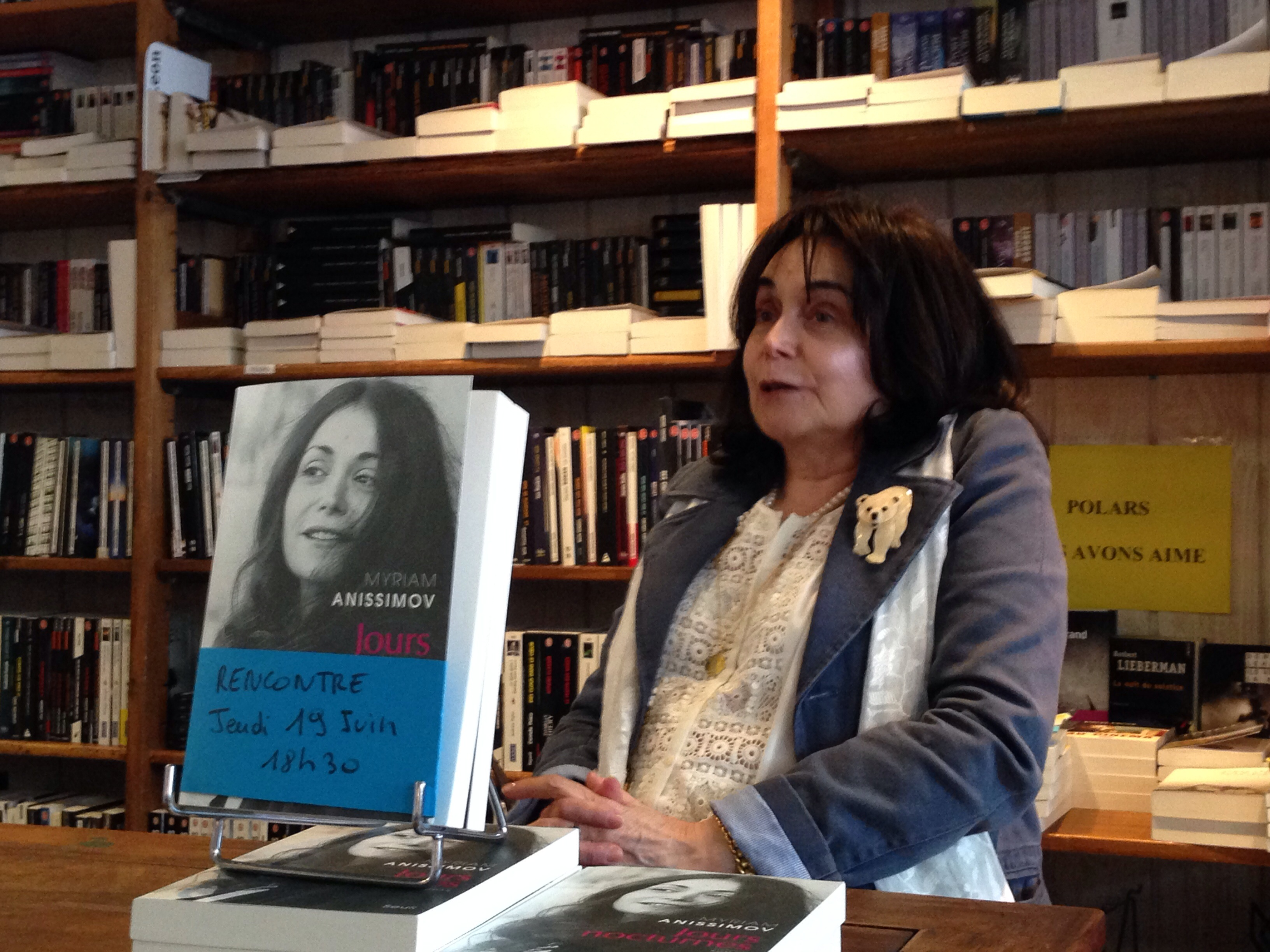 Myriam Anissimov à la librairie Folies d'encre, Montreuil, en juin 2014